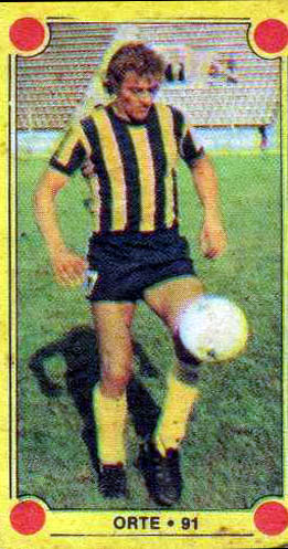 Félix Lorenzo Orte